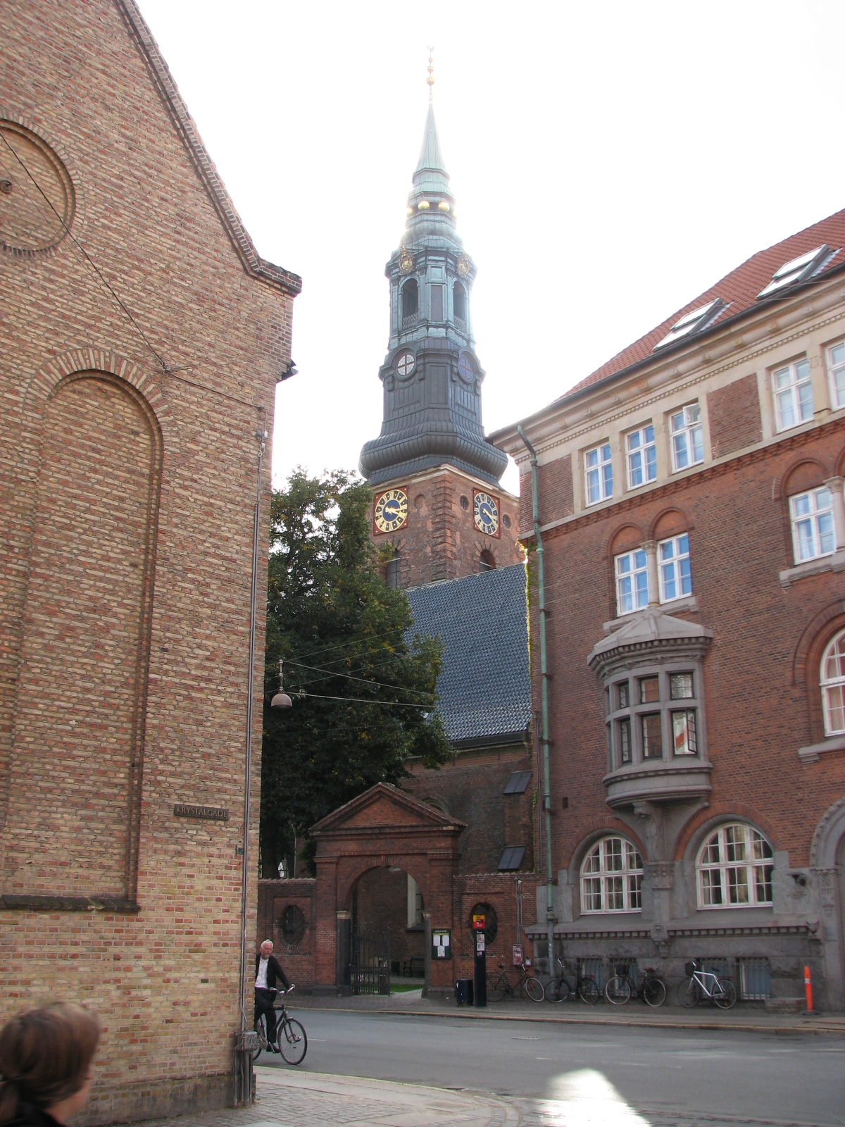 Sankt Petri Kirke